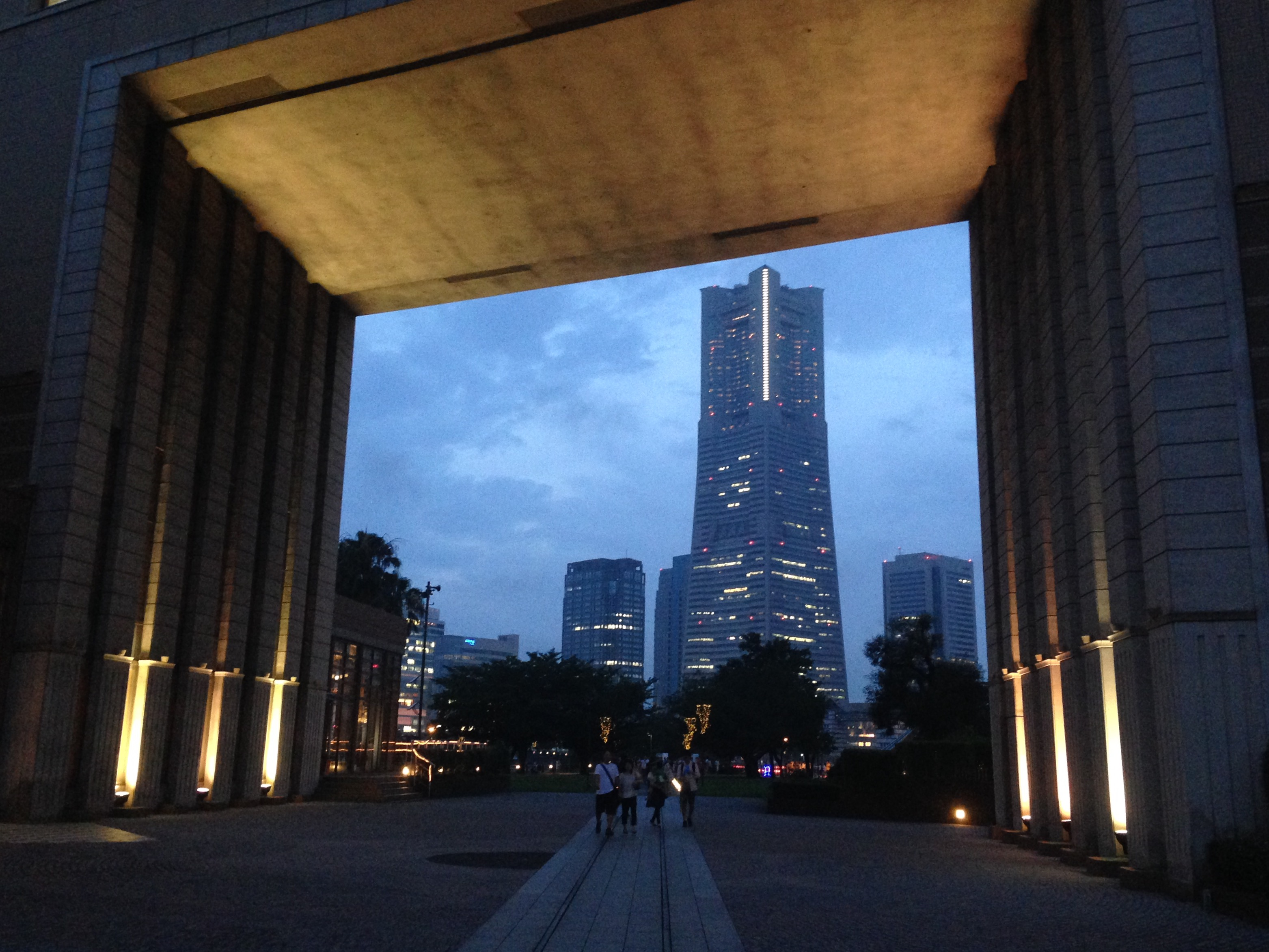 ナビオス横浜（横浜国際船員センター）の下部は絵画の額に見立てた吹き抜け構造となっており、遊歩道の「汽車道」が通っている。遠くに横浜ランドマークタワーが見える。